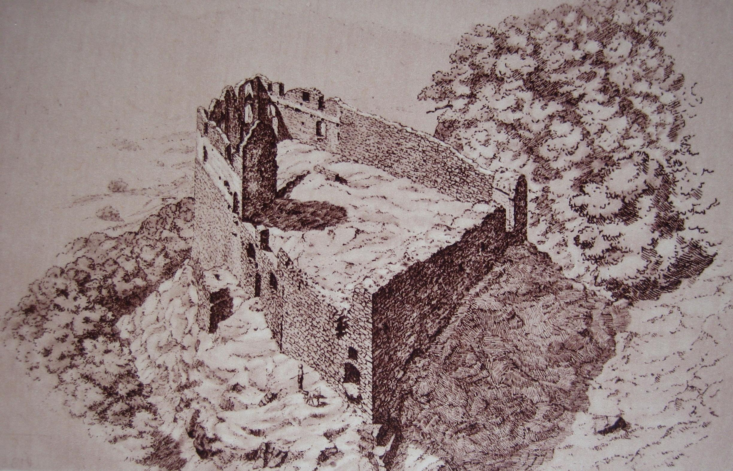 Schloss Wyneg, Zeichnung von R. Kirchgraber, Datum unbekannt